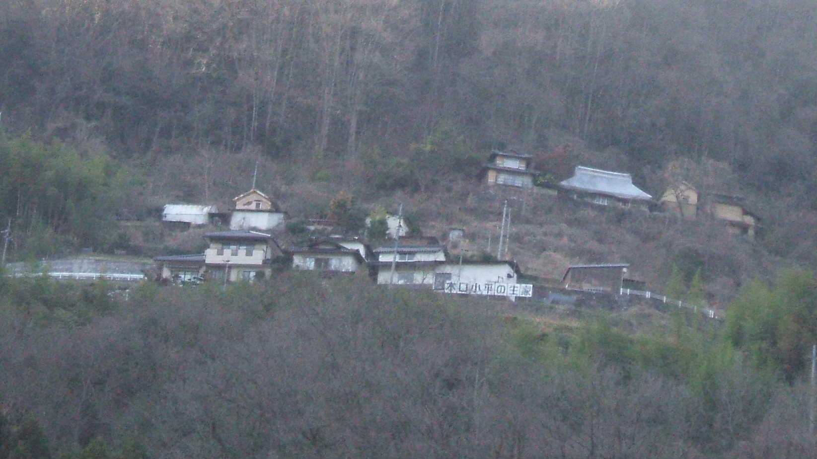 日清戦争の際、「死んでもラッパを放さなかった」とされた木口小平の岡山県高梁市にある生家をふもとの国道313号線より見上げて撮影。もっともラッパを放さなかったという話は木口小平ではなく白神源次郎によるものとの説がある。